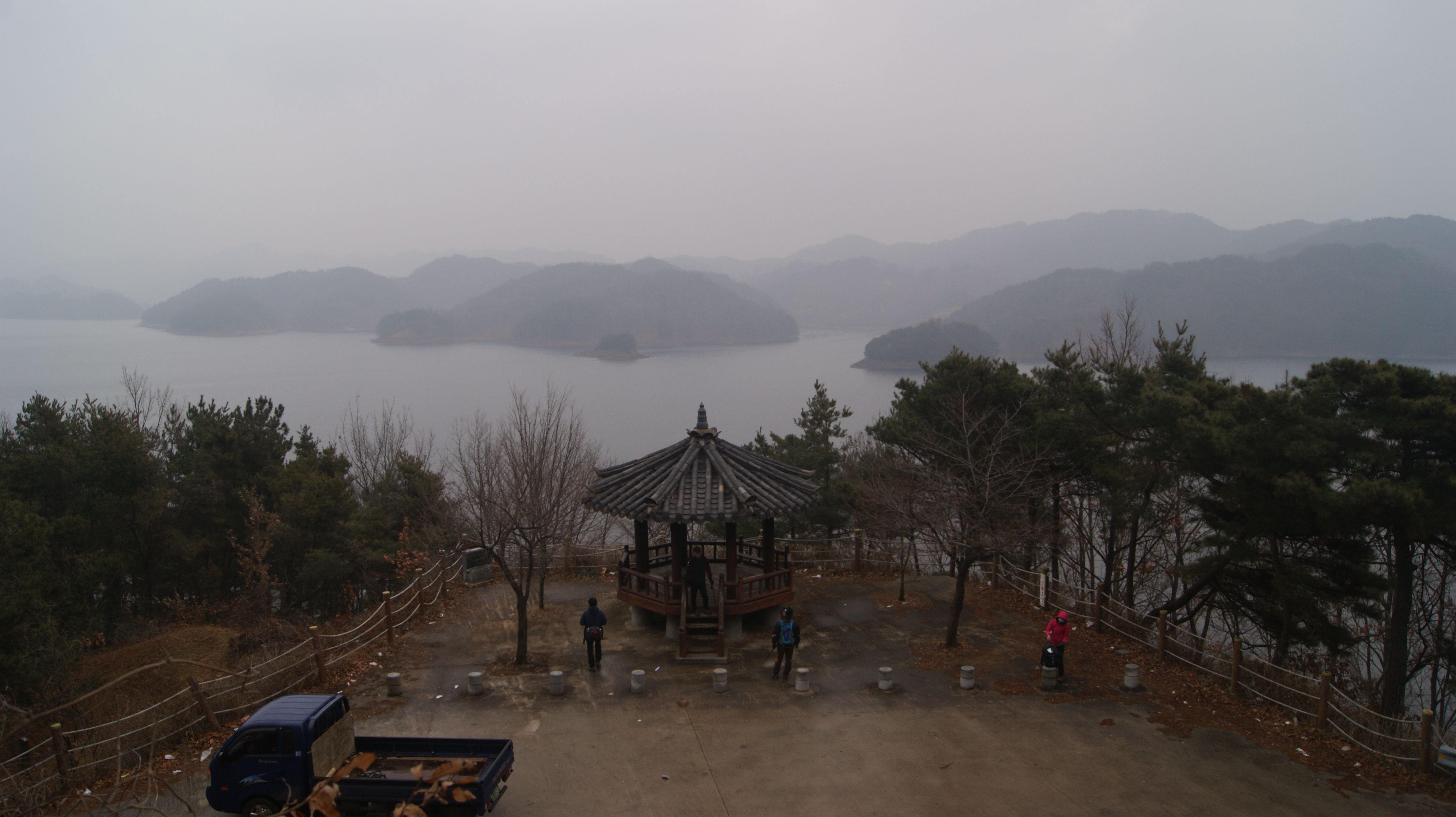 대청호오백리길 2구간_3